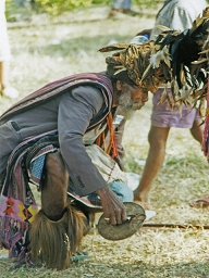 Feierlichkeiten zum Besuch von Xanana Gusmão in Same 2000